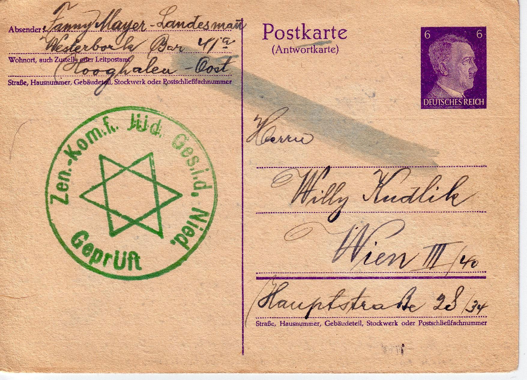 Häftlingskarte aus dem KZ Westerbork vom Dezember 1943 Zensurstempel: "Zen.-Kom.f.Jüd.Ges.i.d. Nied."